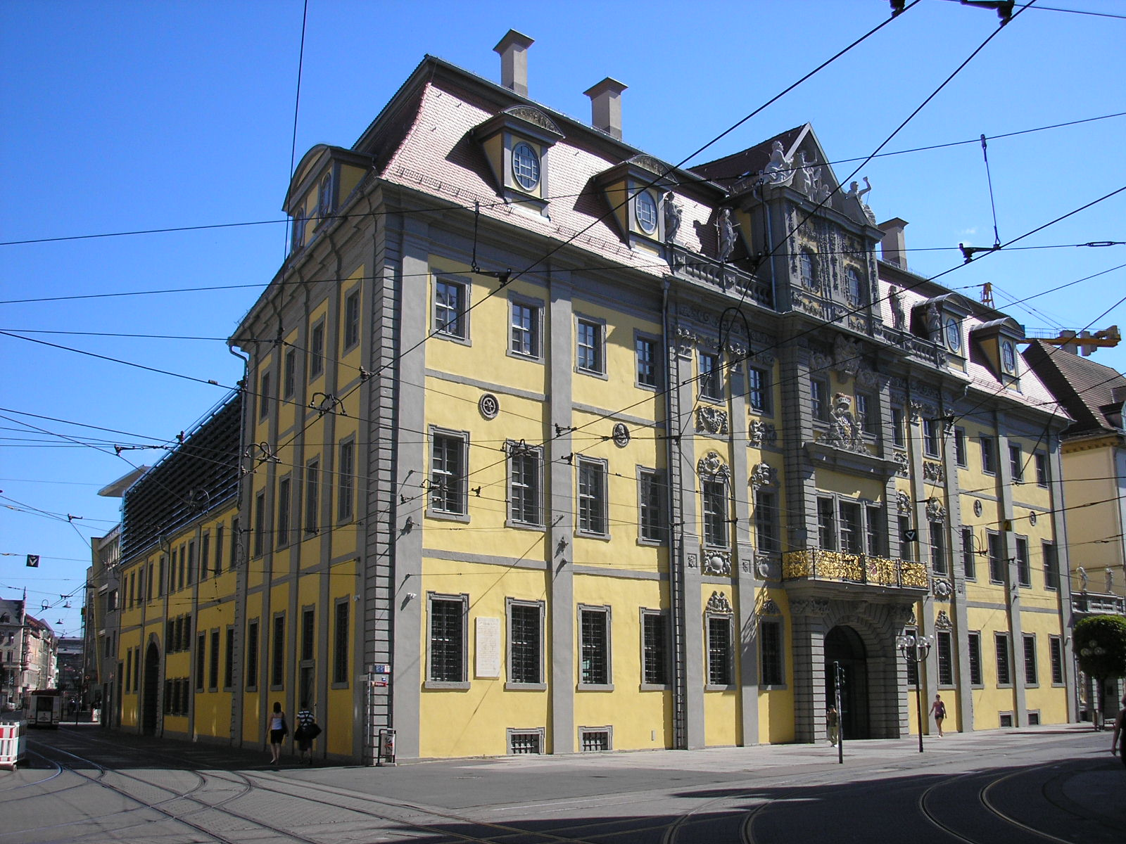 Das Angermuseum im Kurmainzer Pack- und Waagehof in Erfurt.